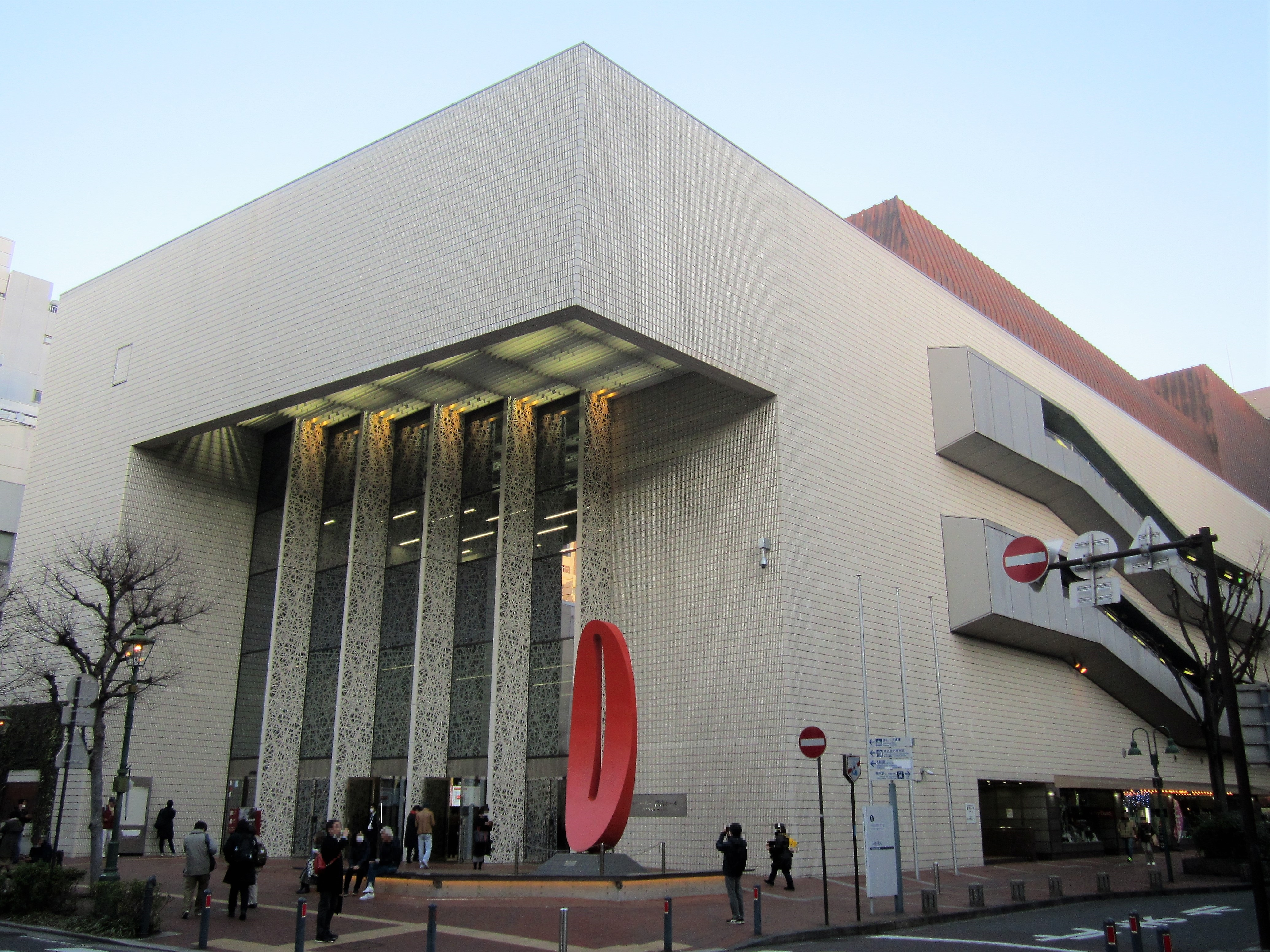 横浜市市民文化会館関内ホール